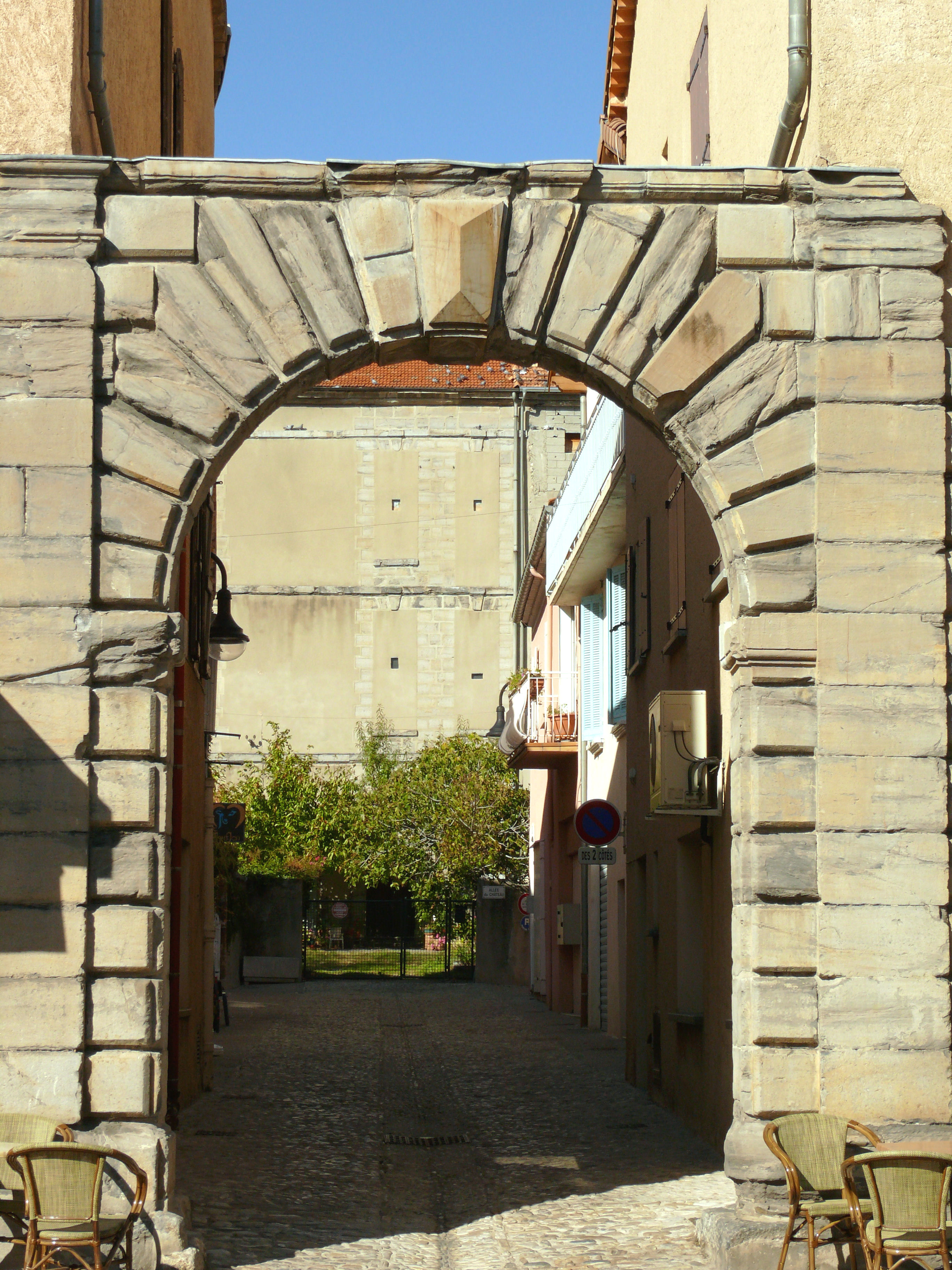 Laragne-Montéglin - Vestiges du château de Laragne - Portail d'entrée